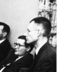 Yeager et Buchanan